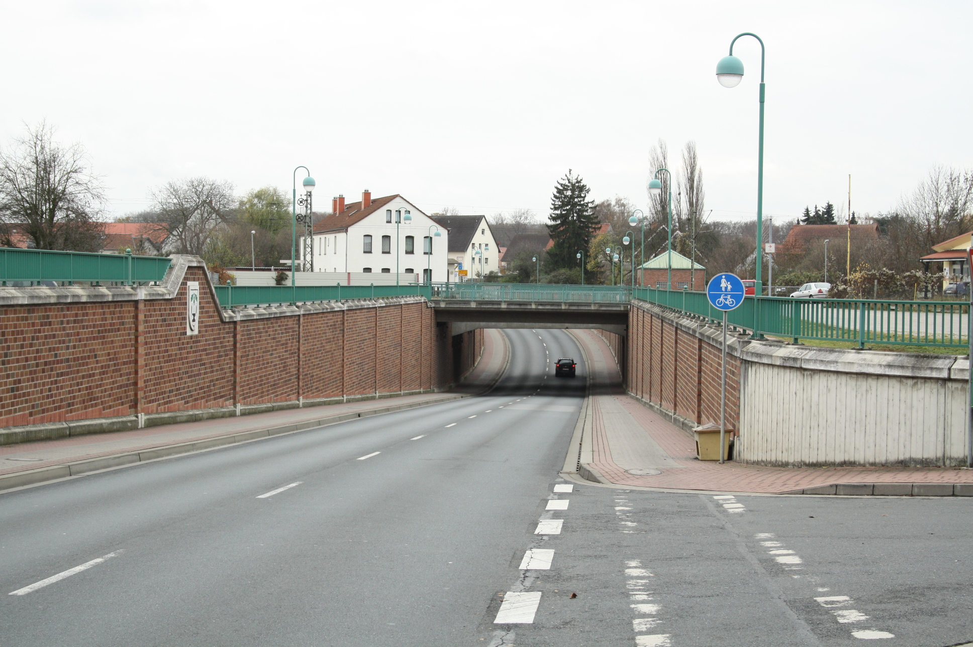 Eisenbahnunterführung Hämelerwald der Bahnstrecke Hannover-Braunschweig im Verlauf der Landesstraße 413